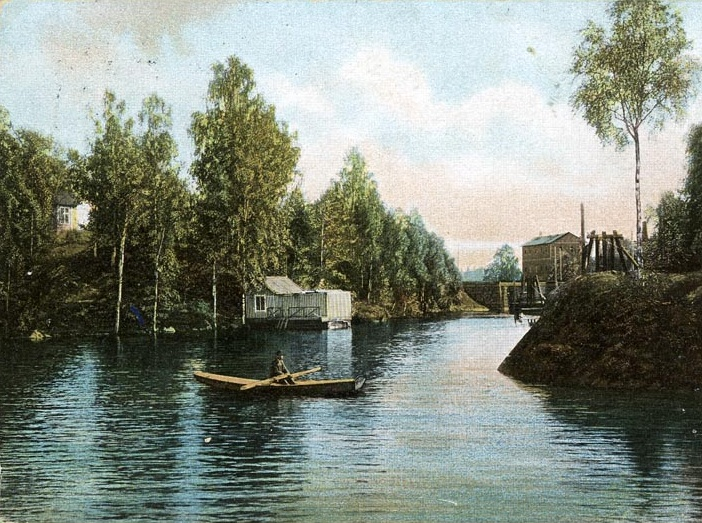 Bredsjö. Kolorerat vykort från omkr. år 1900.